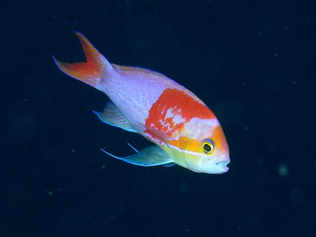 ナガハナダイ♂ Pseudanthias elongatus